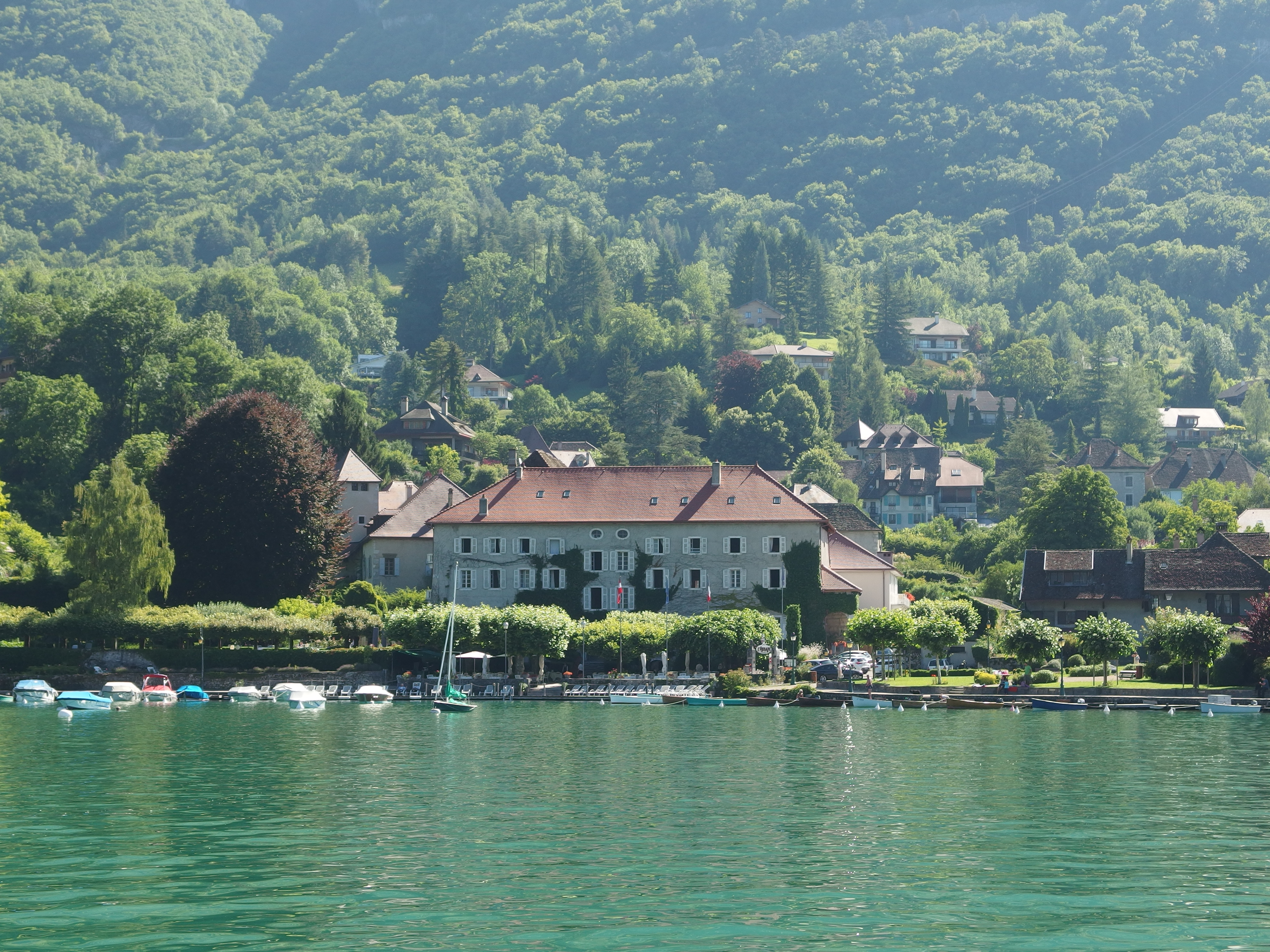 Abbaye de Talloires